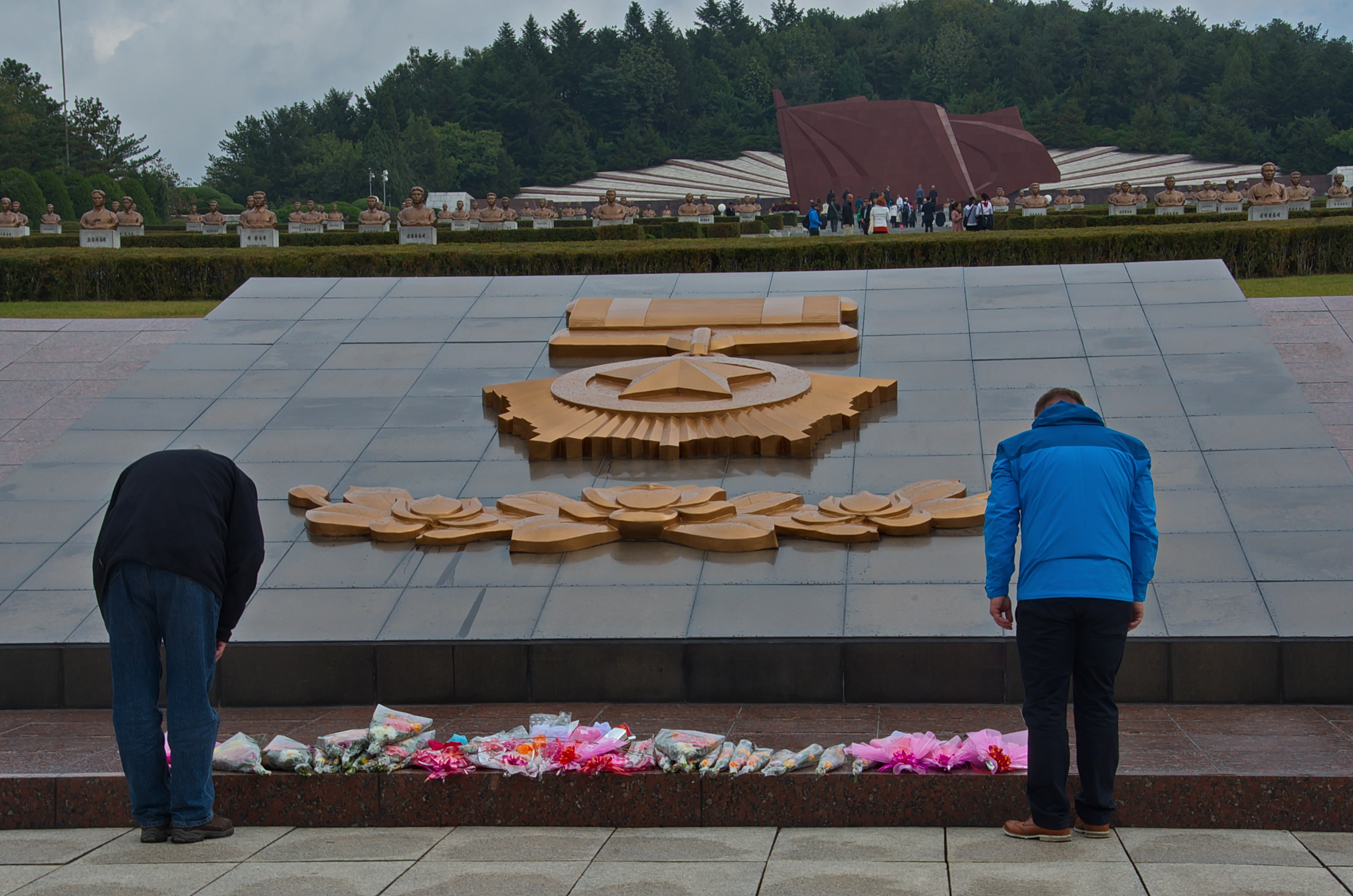 Nordkorea 2015 - Pjöngjang - Friedhof der Märtyrer